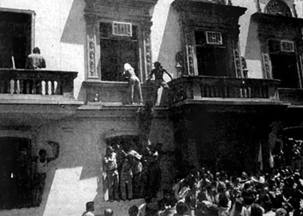 Santiagueñazo